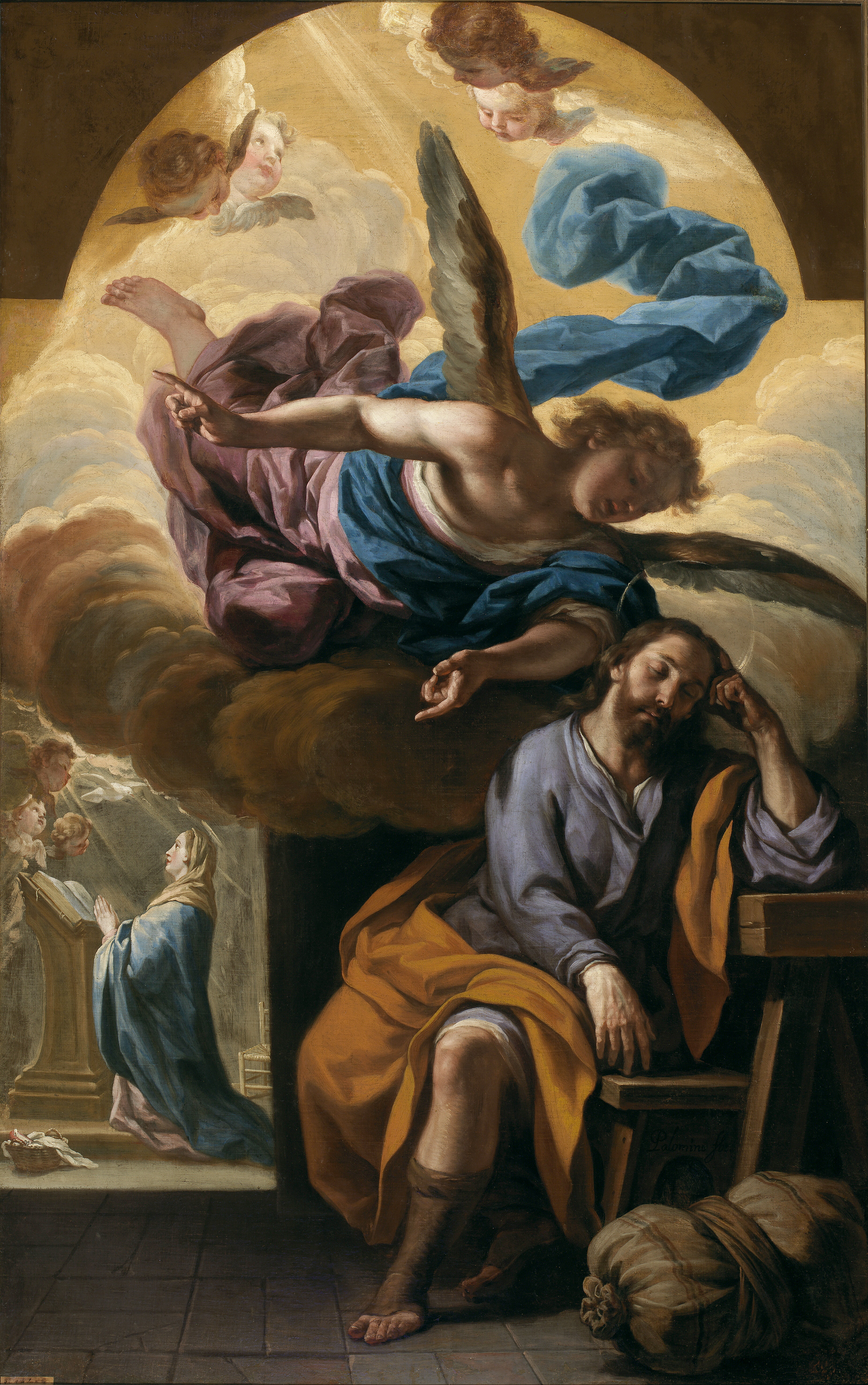 La obra representa el momento en que San José, el esposo de la Virgen María, fue avisado en sueños de que huyera a Egipto con su esposa para salvar al Niño Jesús de ser asesinado por el rey Herodes el Grande.